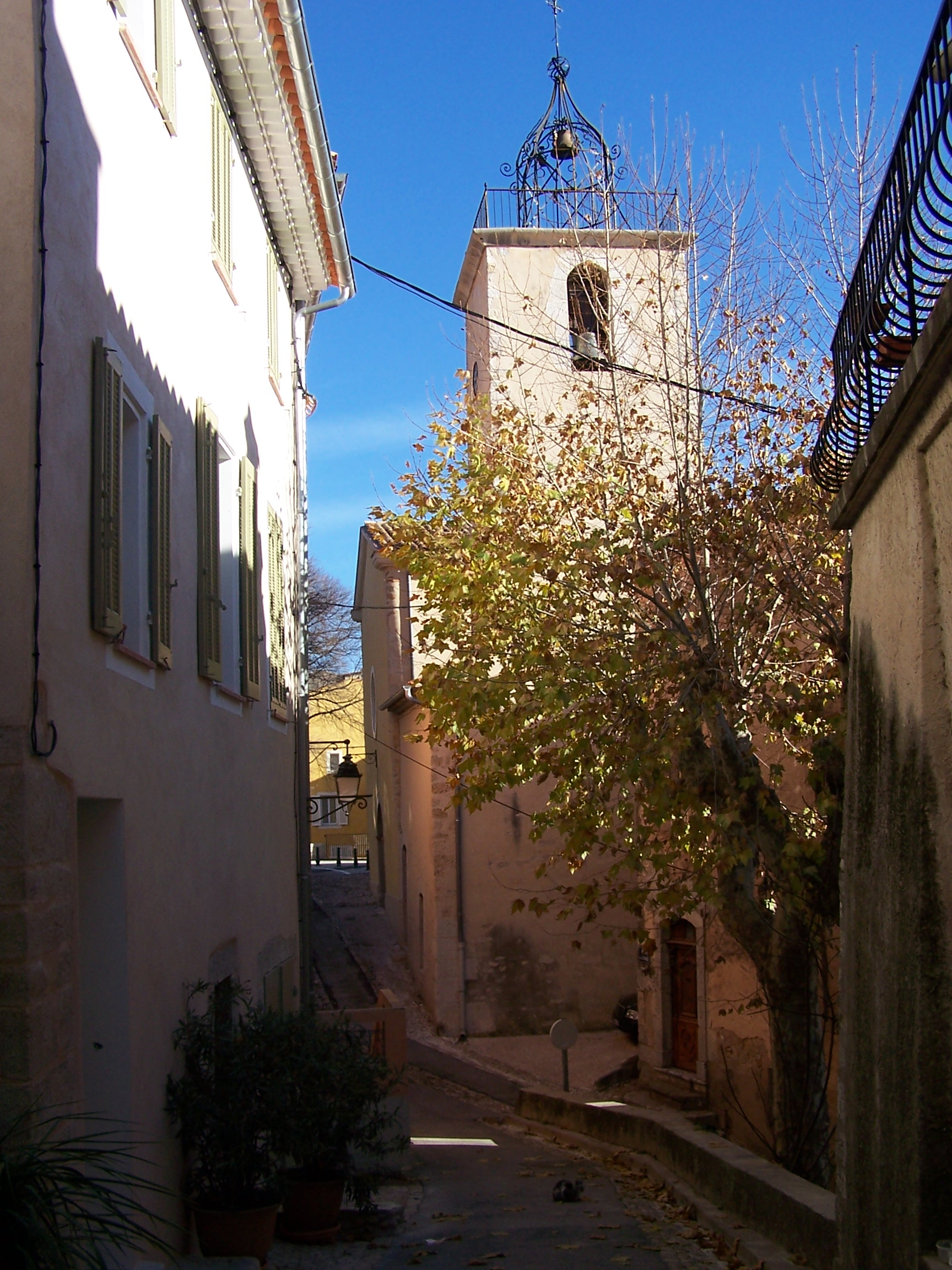 village de Camps-la-Source, Var, France